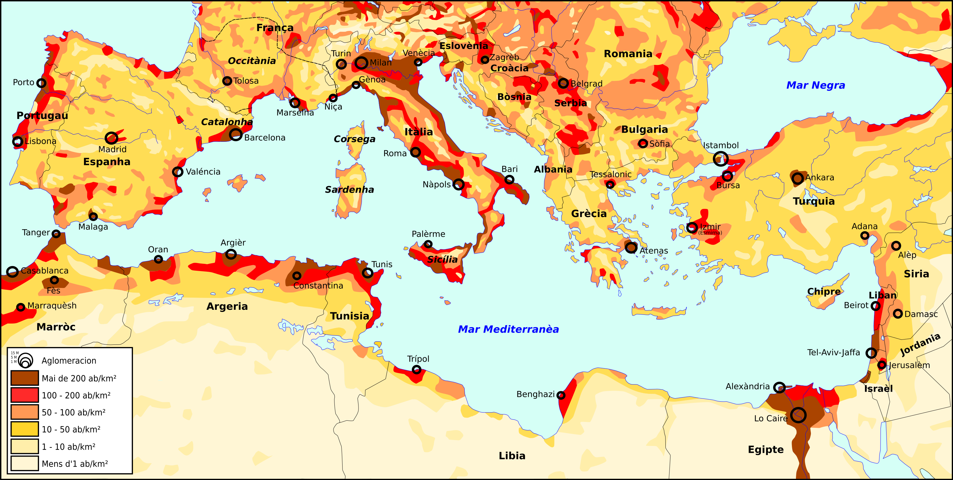 Densitat de populacion a l'entorn de la Mar Mediterranèa.